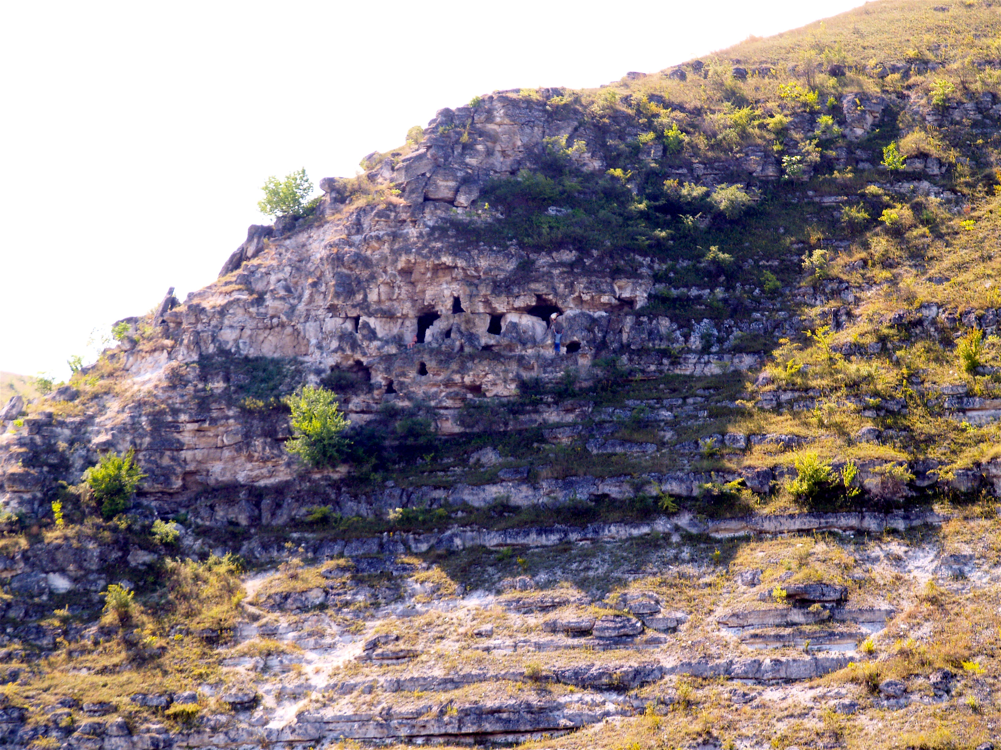 Orhei Vechi, Moldova